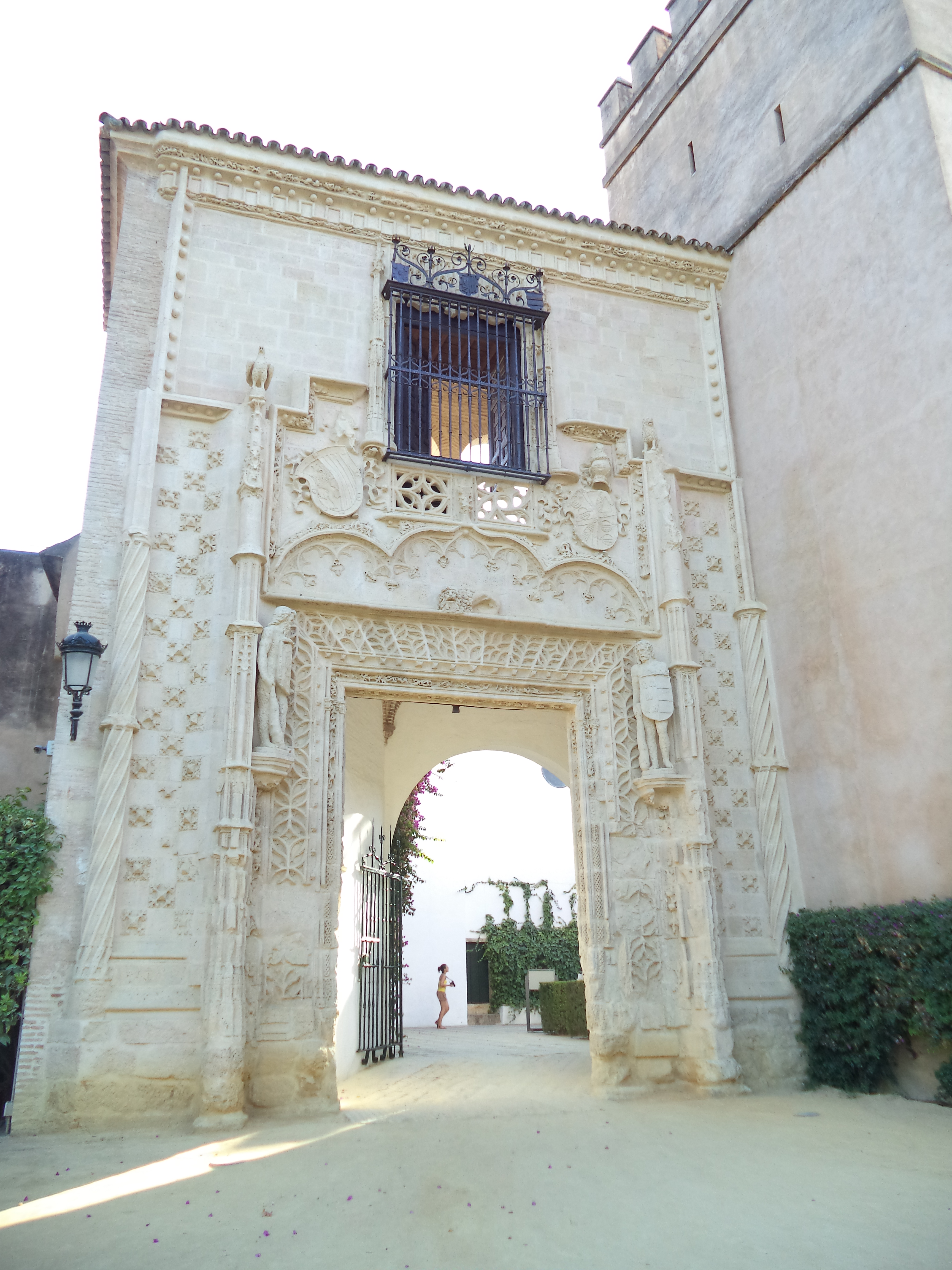 Puerta del Palacio de los Duques de Arcos, enclavado en la localidad de Marchena, por lo que también es llamada Puerta de Marchena. A comienzos del siglo XX, reinando Alfonso XIII, esta puerta, de la época de los Reyes Católicos, fue trasladada al Alcázar de Sevilla